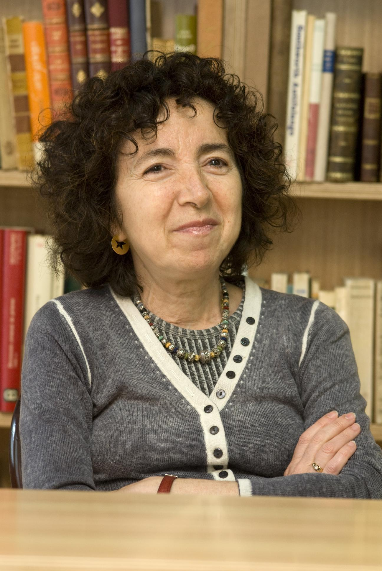 Marilar Aleixandre. Galicia (Spain)